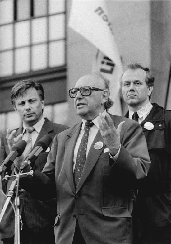 ADN-ZB Oberst 16.3.90 Berlin: Mit einer Kundgebung auf dem Platz der Akademie schloß der Bund Freier Demokraten seinen Wahlkampf ab. Zu den Rednern gehörte auch der Vorsitzende der F.D.P. Bundestagsfraktion, Wolfgang Mischnick (m), links Prof. Rainer Ortleb (LDP).